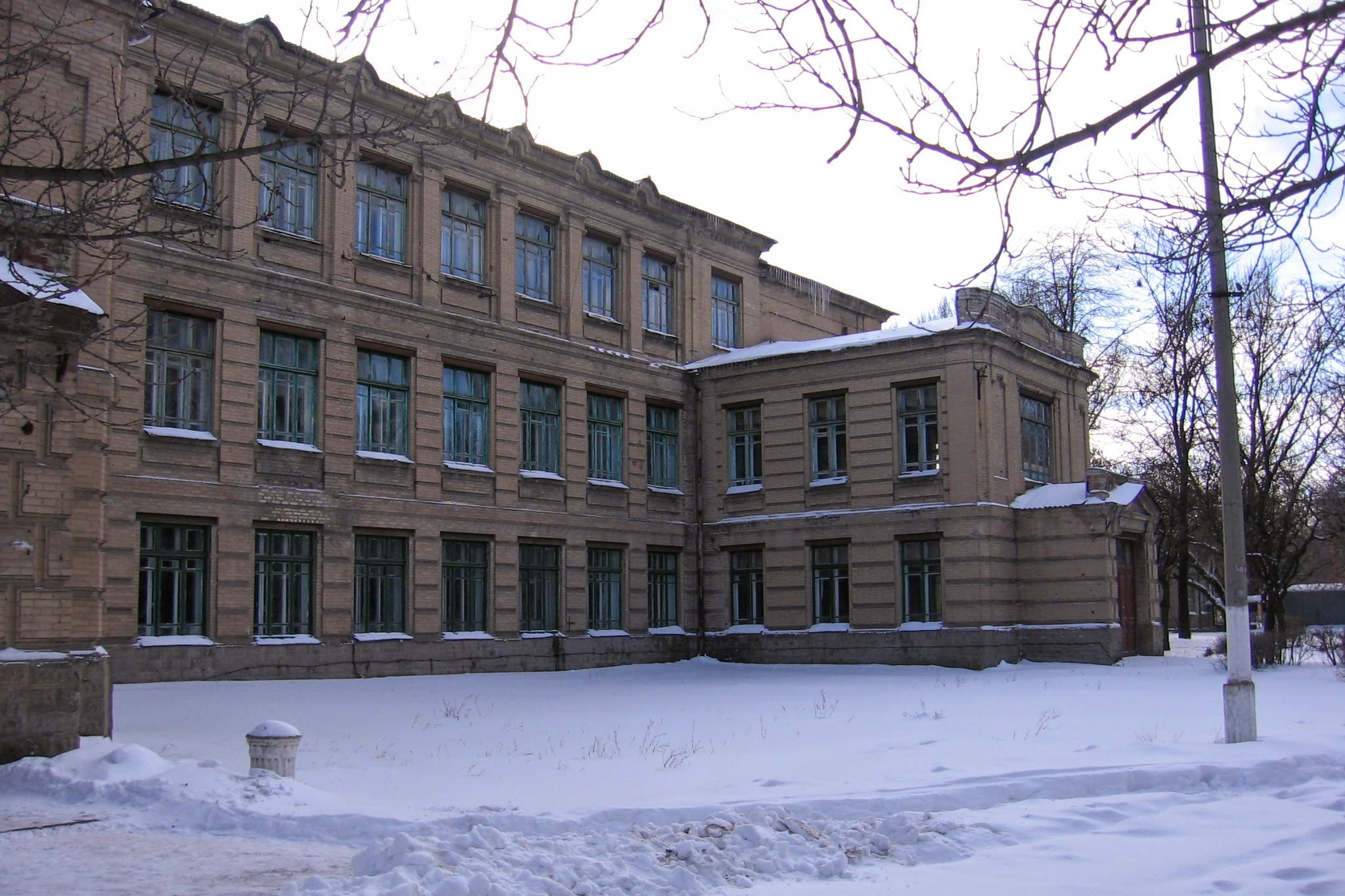 2-й (старый) корпус Славянского химико-механического техникума - январь 2006 г.